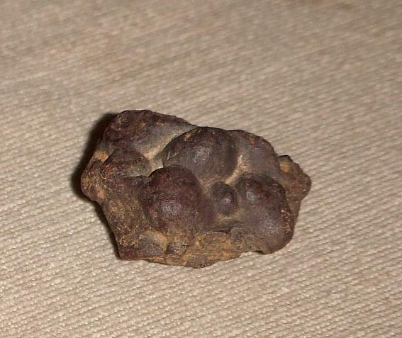 Coprolithe éocène région Ijenda/BURUNDI